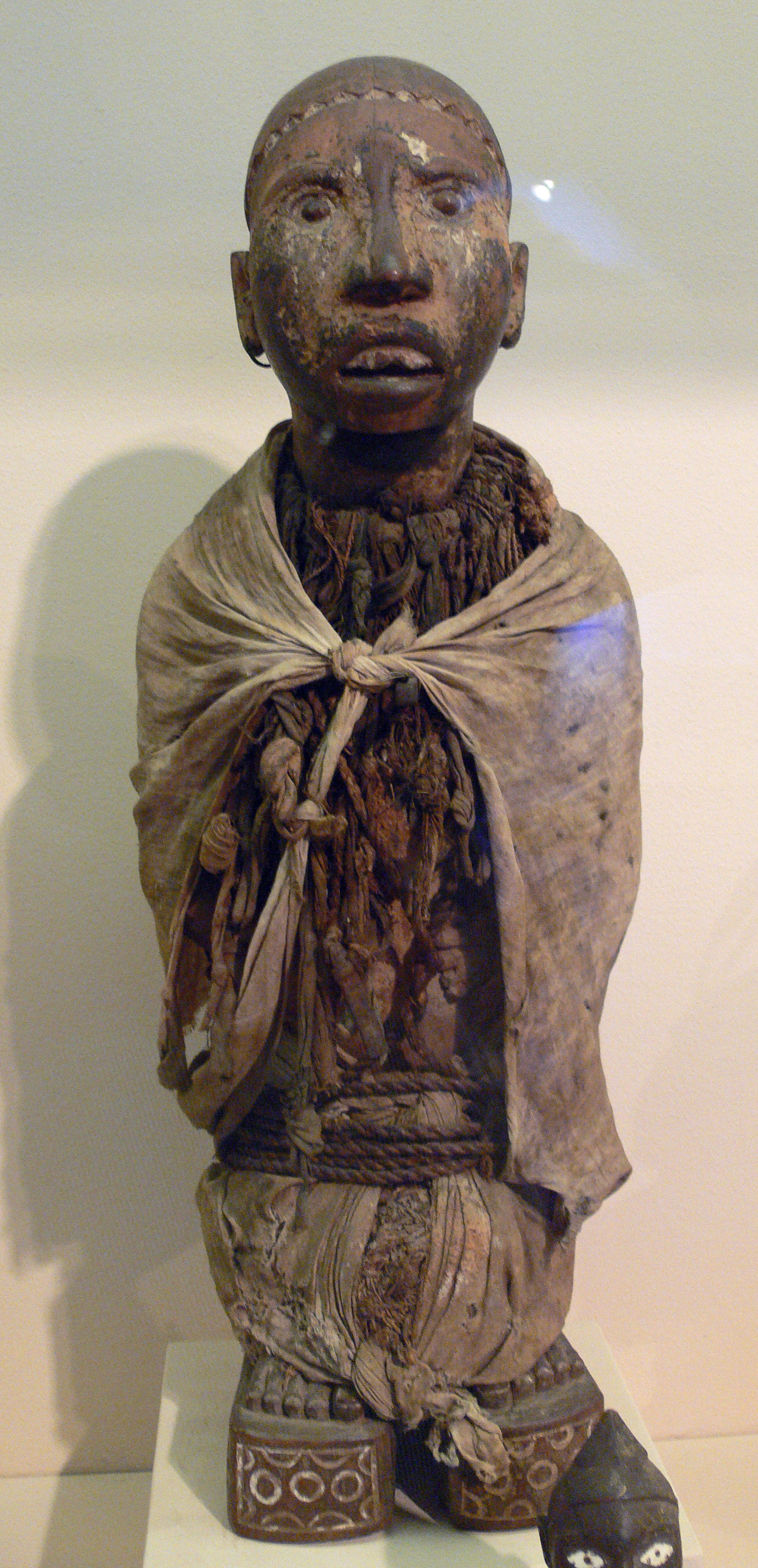 Stuttgart, Linden-Museum Nagelfigur; Holz, Eisen, Harz, Baumwolle, Pflanzenfasern, Kaurischnecken; Yombe (Angola), Inv. Nr. 35627 (Figur zur Regulierung der Menstruation)